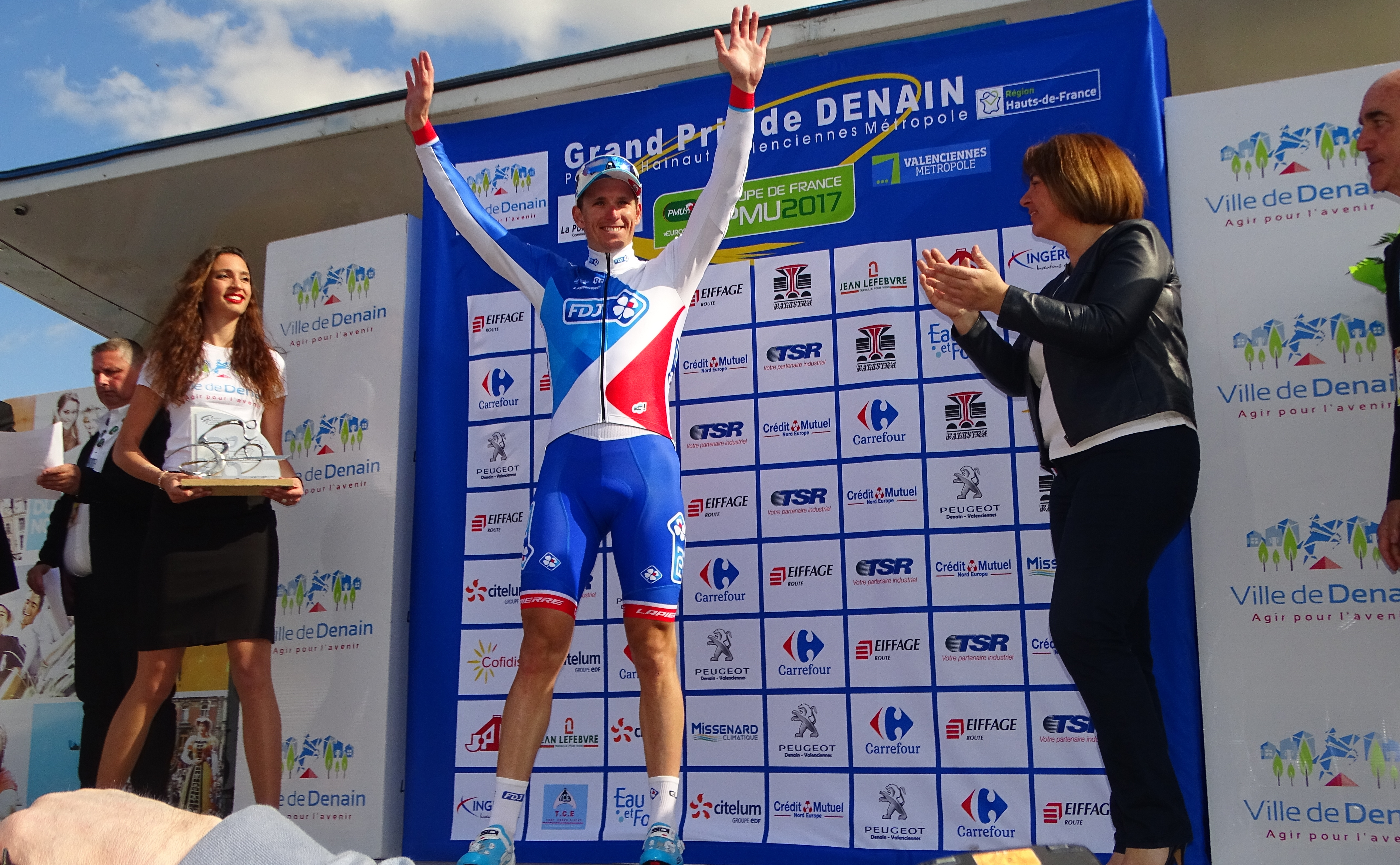 Reportage réalisé le jeudi 13 avril à l'occasion du départ et de l'arrivée du Grand Prix de Denain 2017 à Denain, Nord, Nord-Pas-de-Calais-Picardie, France.